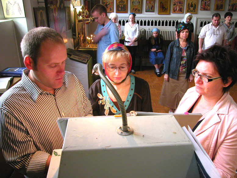 Kirche «Maria Obchut» in Düsseldorf